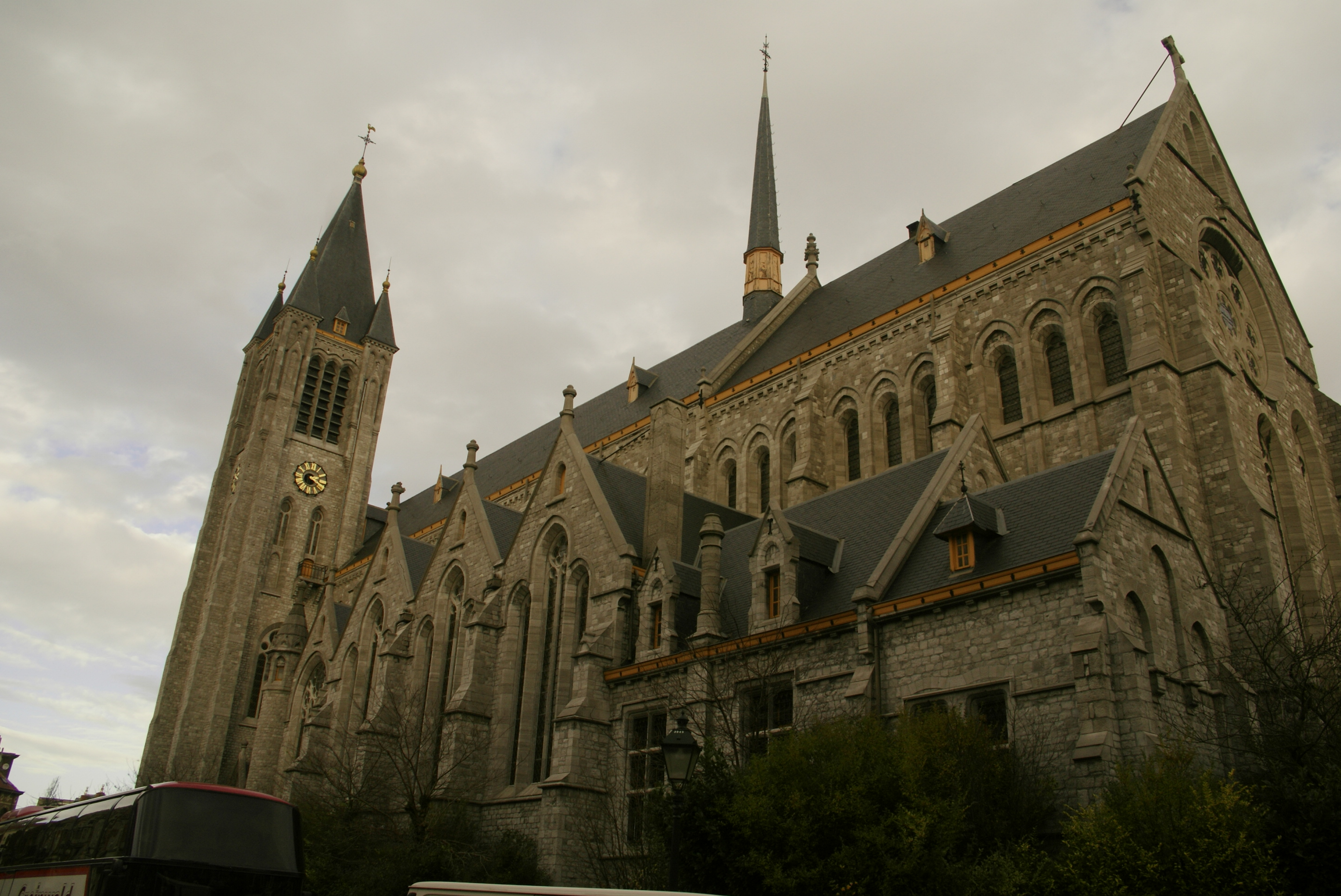 Eglise Saint-Antoine Church in Etterbeek, Brussels Belgium